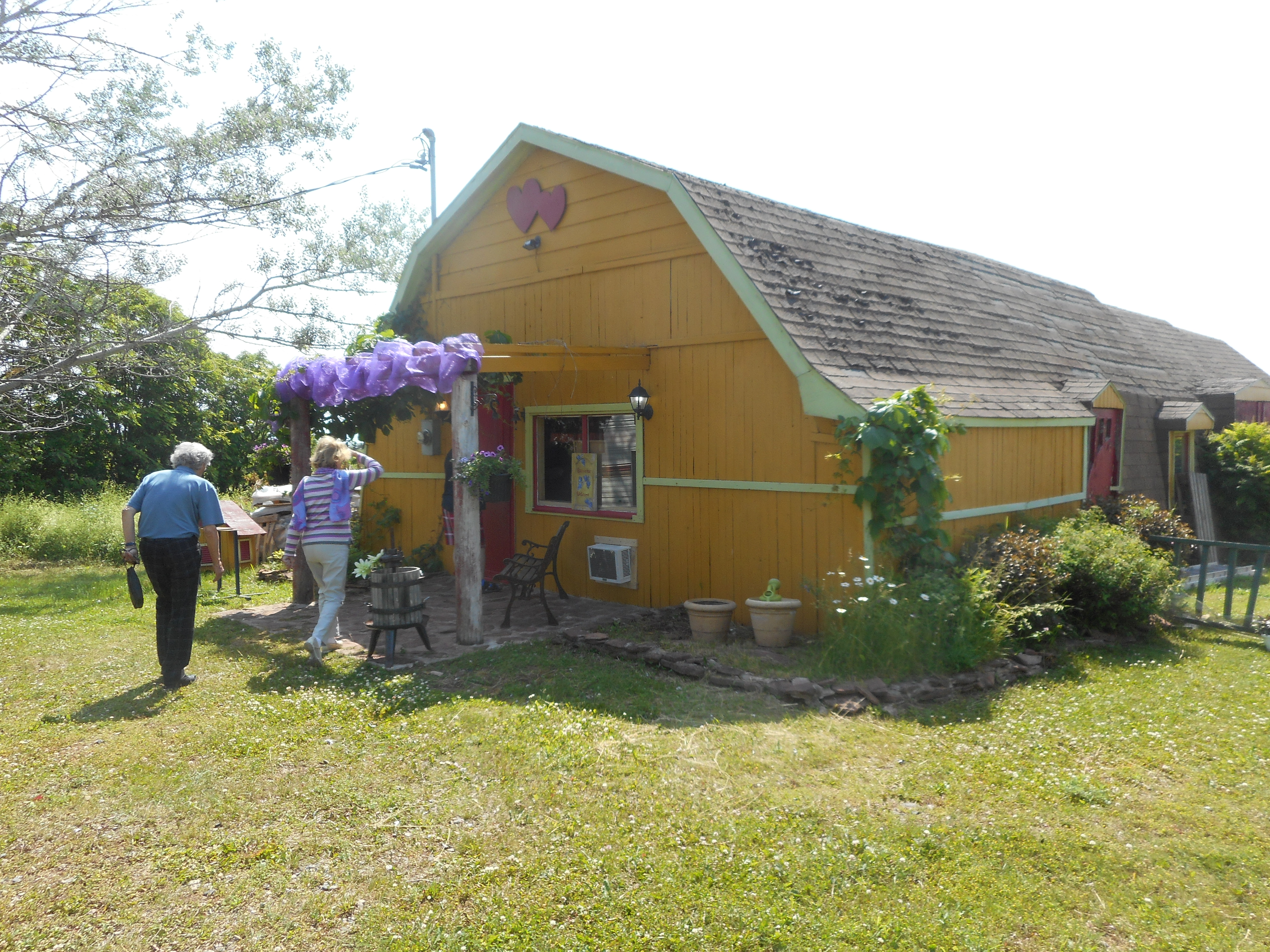 Vignoble Le Plein d'amour, 306, route 132, Hope, Québec